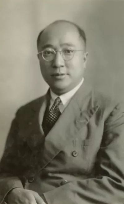 中文（中国大陆）: 協和醫學院院長李宗恩